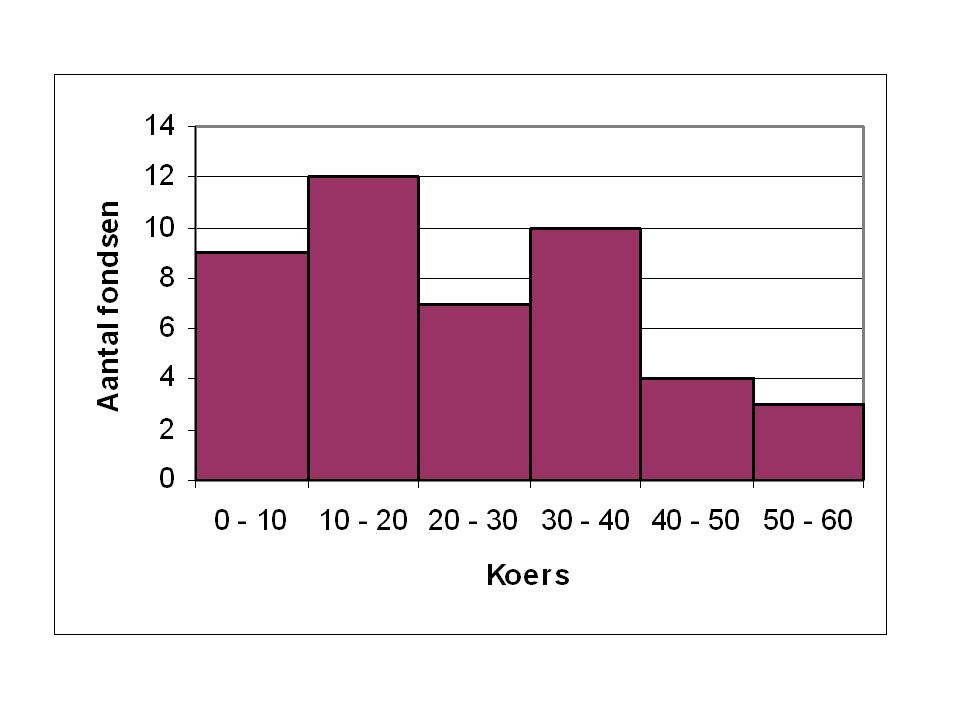 Verdeling koersen Amsterdamse effectenbeurs per 21-9-2006. Alleen AEX en AMX fondse, zonder onroerend-goed fondsen